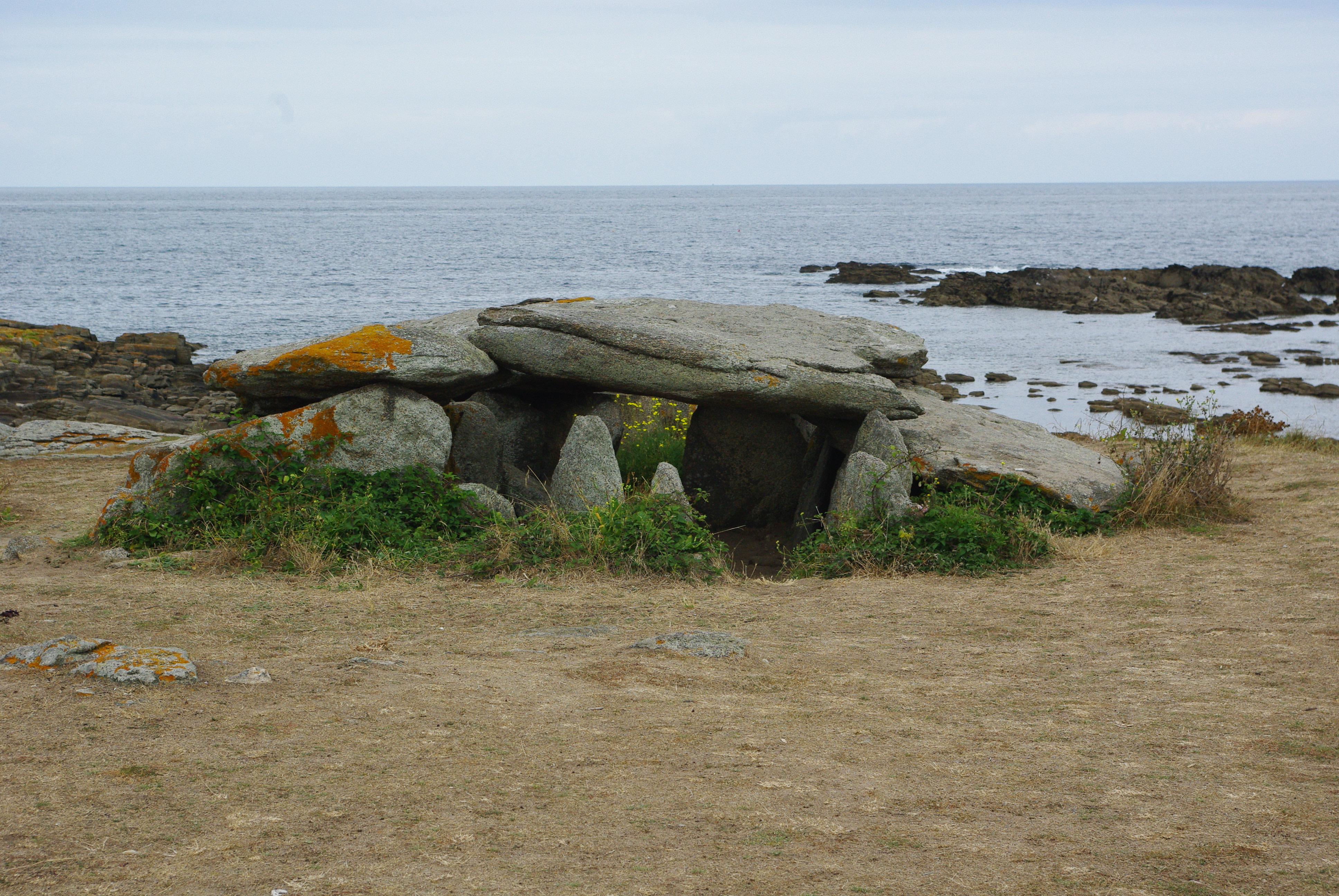 Dolmen de la Planche à Puare, Ile d'Yeu, Vendée, France.